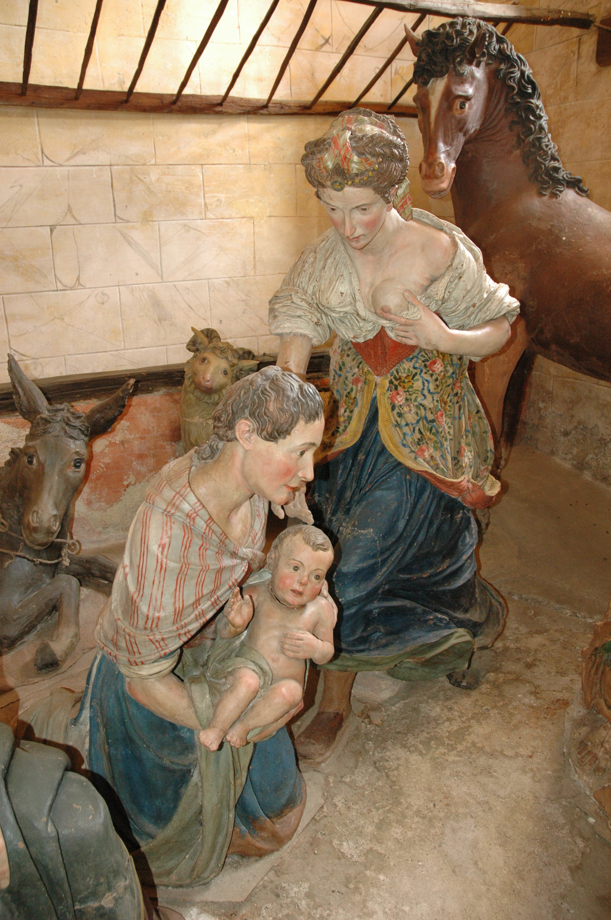 Sacro Monte di Orta. Figure.